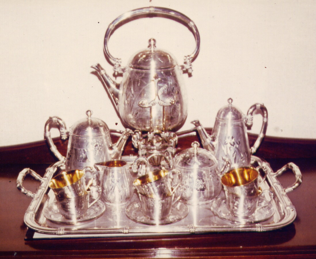 photo d'un service à thé et café, fabrique Christofle, décoré de glycines, anse et versoir bambou, forme en poire, année 1875 (série Christofle: n° 1101758, n° 1100168, n° 1096814, quadripode: n° 1092484) (photo 1979)